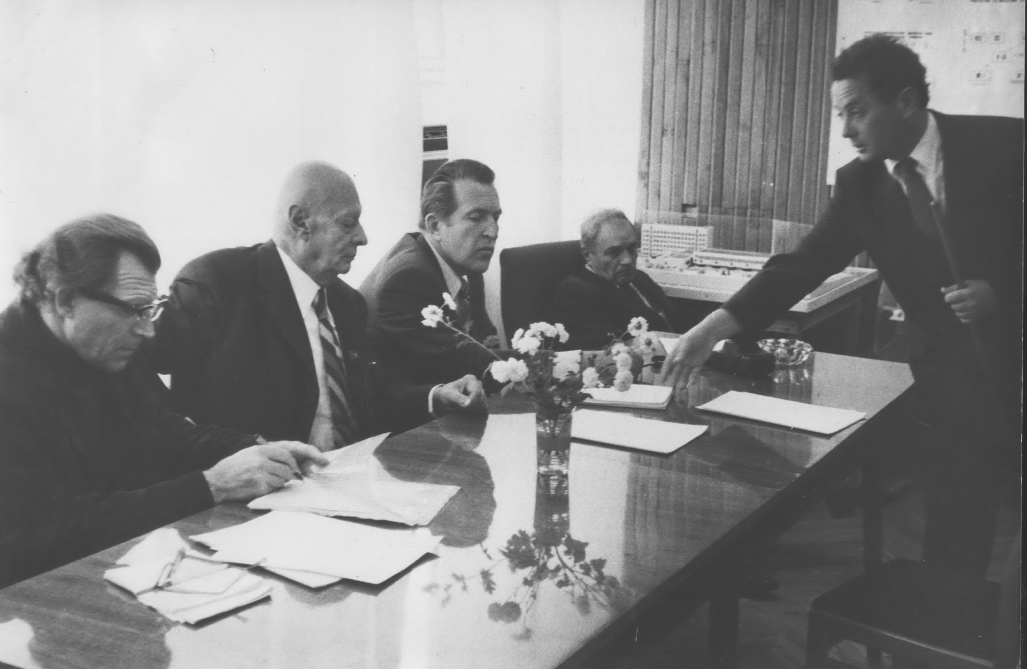 На снимке слева на право: академик А.В.Гапонов-Грехов, Президент АН СССР академик А.П.Александров, Первый секретарь Приморского Крайкома КПСС В. П.Ломакин и Председатель Президиума ДВО АНСССР академик Н.А.Шило.